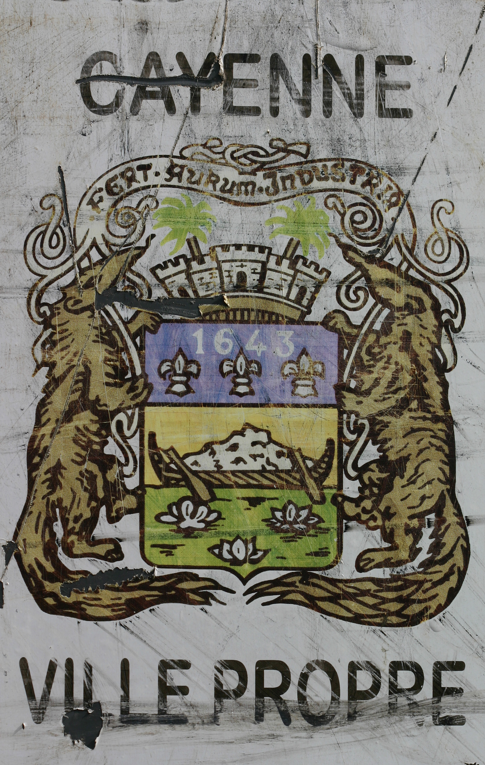 Blason de la ville de Cayenne ; devise Fert Aurum Industria